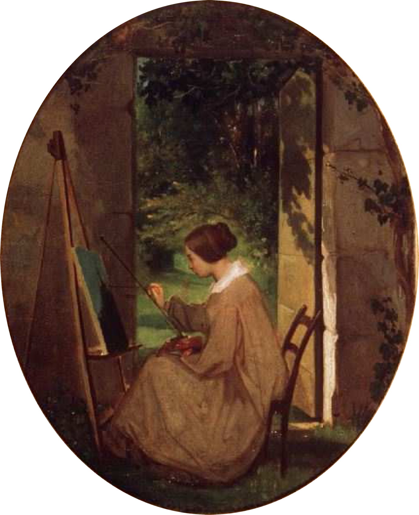 Adèle Gamel peignant, potrait présumé d'Adèle Gamel, non daté, environs 1840. Huile sur toile. 41 x 38,5 cm. Non signé. Collection particulière.